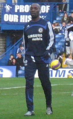 Claude Makélélé